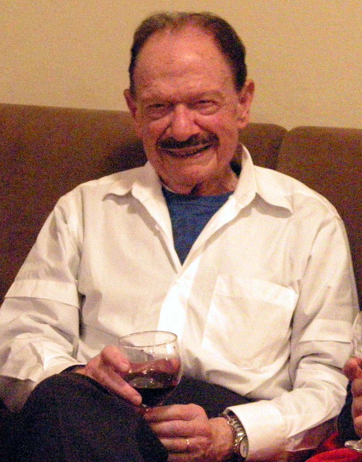 Prof. Francisco Mauro Salzano